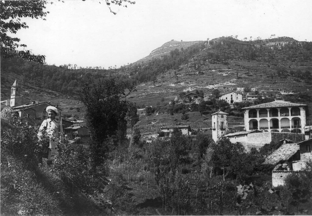 Un nen amb el Cavaller de Vidrà i el Bartolí al fons. Lluís Vila i d'Abadal (Entre 1910 i 1936)